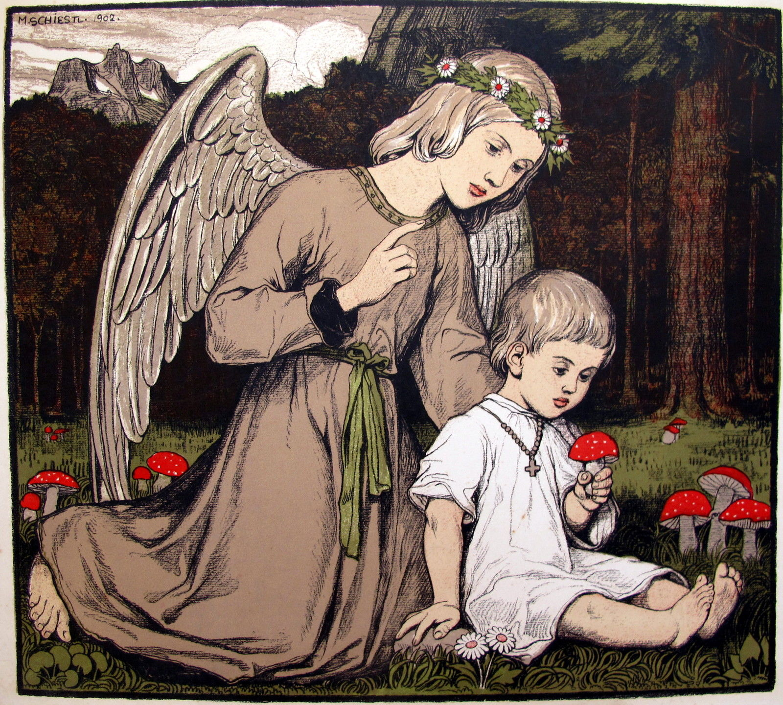 Lithografie von Matthäus Schiestl (1869-1939): Schutzengel bewahrt Mädchen vor dem Genuss giftiger Fliegenpilze